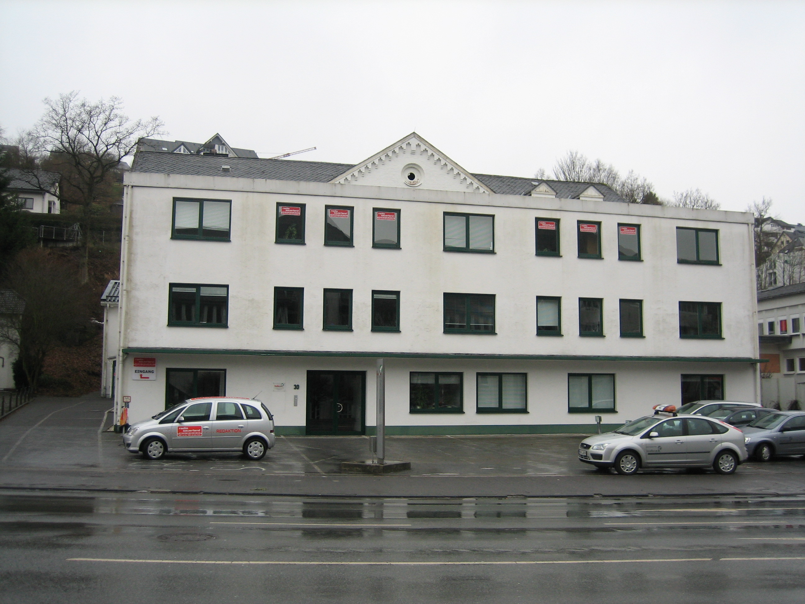 Gebäude von Radio Sauerland in Meschede, Steinstraße. Studio im 2. Stock.